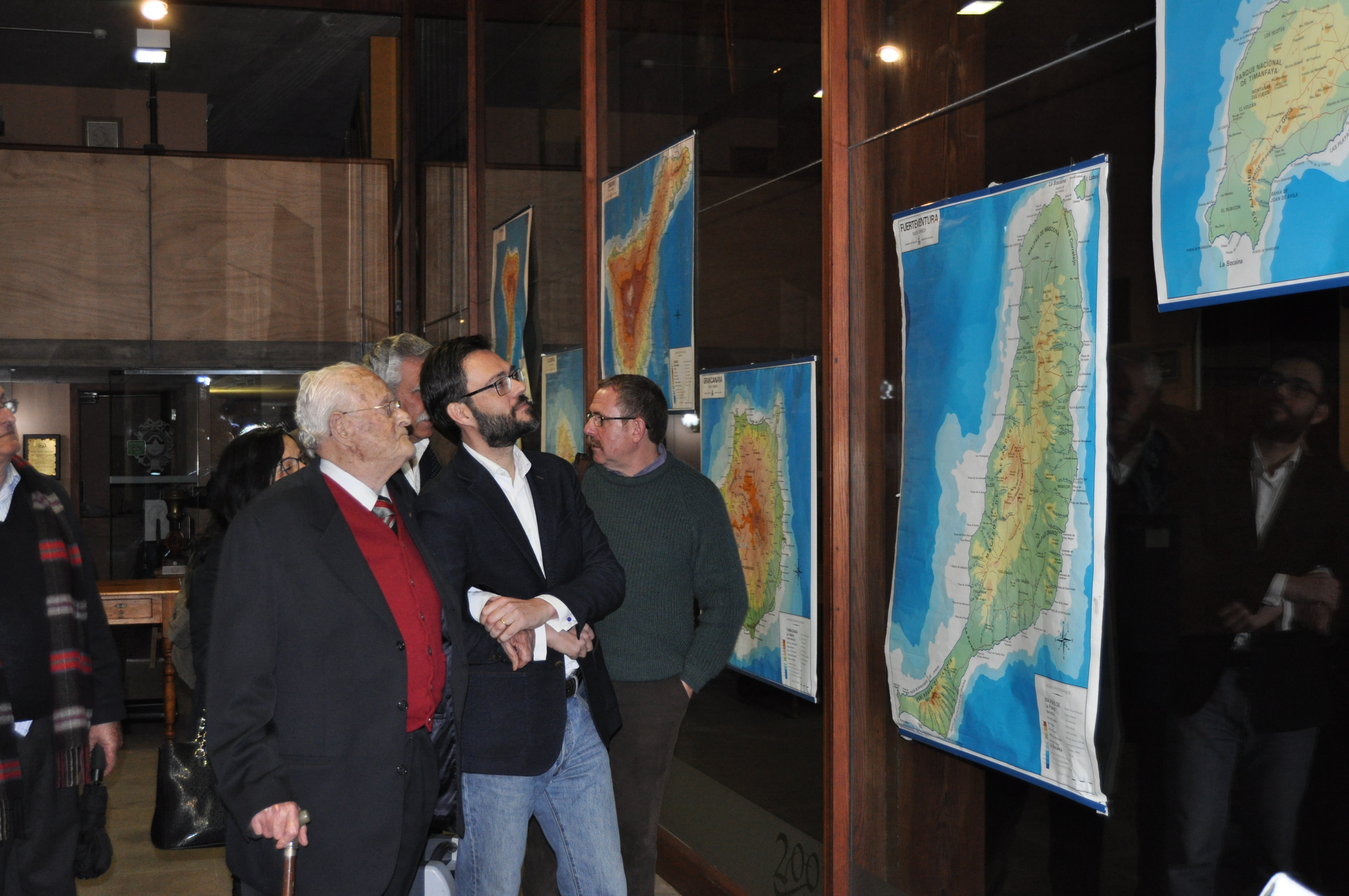 Leoncio Afonso durante la exposición-homenaje en la Real Sociedad Económica de Amigos del País de Tenerife, observando los Mapas Murales de Canarios expuestos